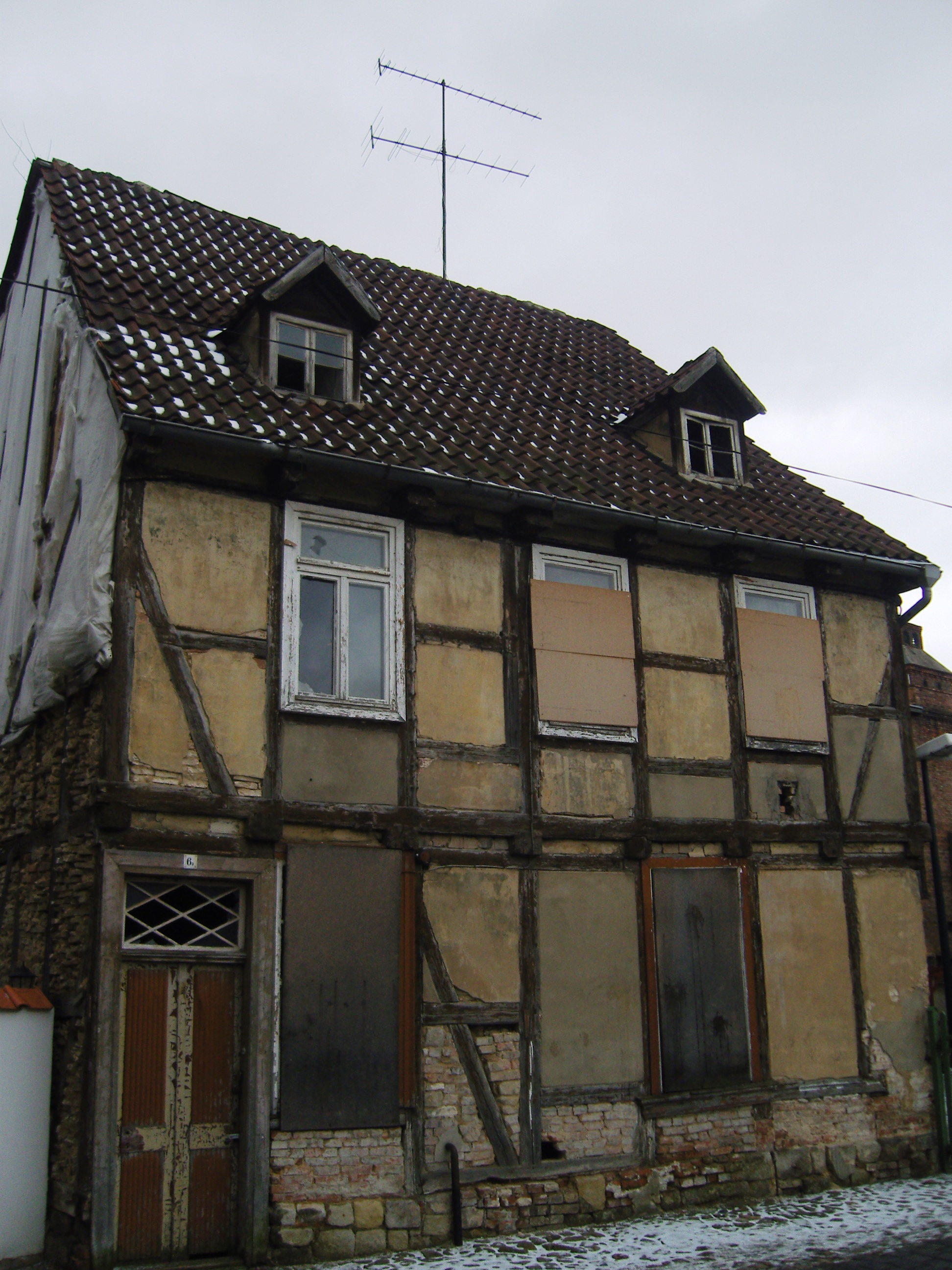 Denkmalgeschütztes Wohnhaus in der Weberstraße 6a in Quedlinburg